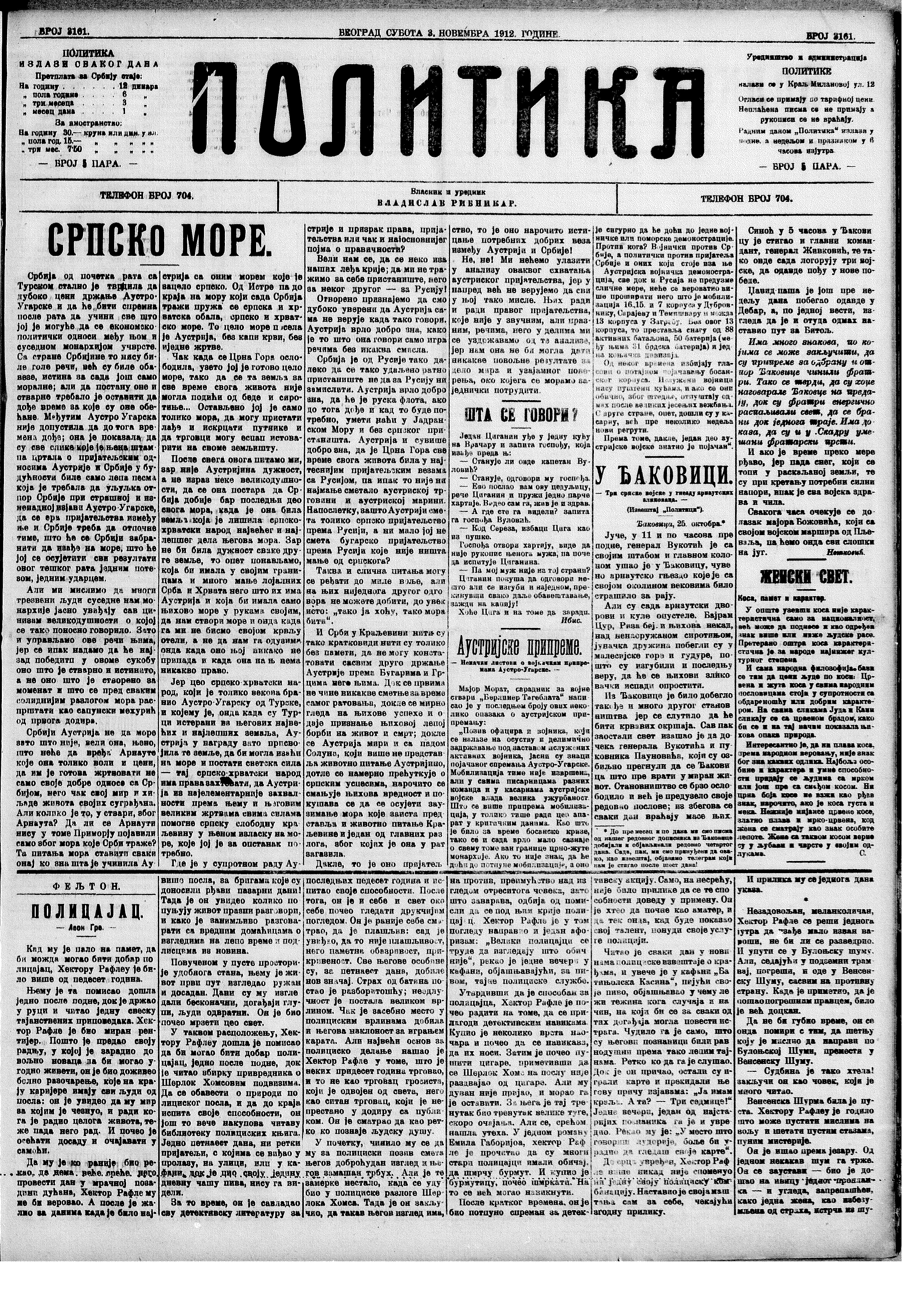 Naslovna stranica Politike od 3. novembra 1912 (po julijanskom kalendaru) sa udarnom vešću o izlasku srpskih trupa na jadransko more.